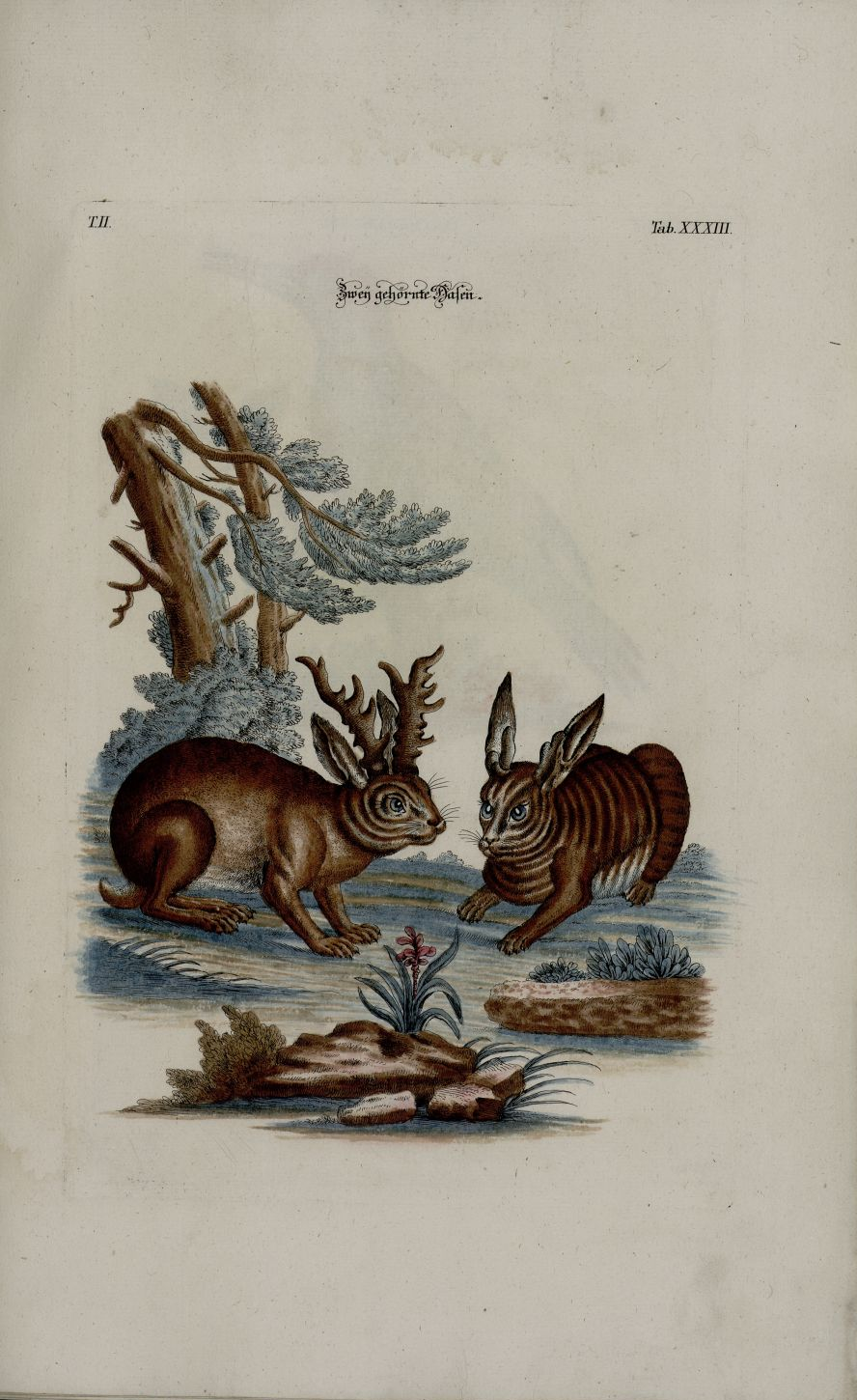 Angenehmer und nützlicher Zeit-Vertreib mit Betrachtung curioser Vorstellungen allerhand kriechender, fliegender und schwimmender, auf dem Land und im Wasser sich befindender und nährender Thiere, sowohl nach ihrer Gestalt und äusserlichen Beschaffenheit, als auch nach der accuratest davon verfertigten Structur ihrer Scelete oder Bein-Cörper, nebst einer deutlichen so physicalisch und anatomisch besonders aber osteologisch und mechanischen Beschreibung derselben / nach der Natur gezeichnet, gemahlet, in Kupfer gestochen und verlegt von Johann Daniel Meyer, Miniatur-Mahler in Nürnberg; Band 2; Nürnberg 1752 Tafel 33 Zwei gehörnte Hasen